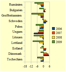 Staatsdefizite im Verhältnis zum BIP in % der Nicht-Eurozone